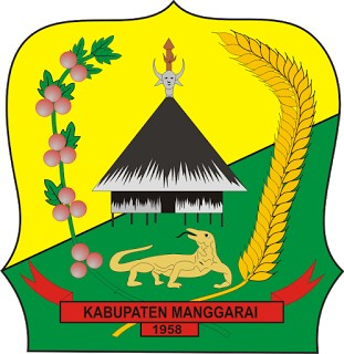 Diperoleh dari Situs Resmi Pemerintah Kabupaten Manggarai